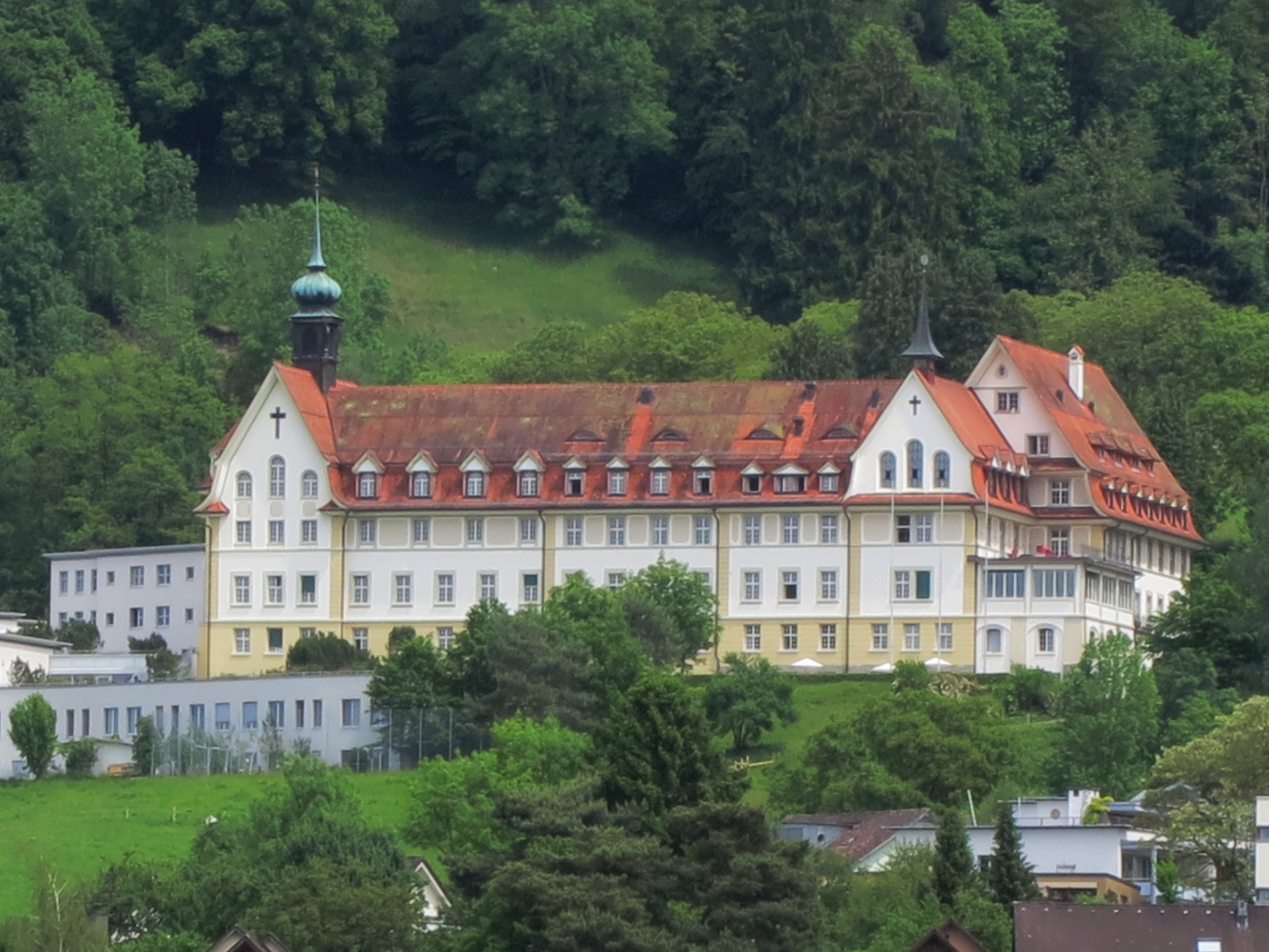 Psychiatrische Klinik Zugersee (Franziskusheim Oberwil), Oberwil bei Zug ZG, Schweiz